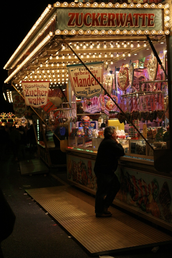 Ein Stand auf dem Memminger Jahrmarkt